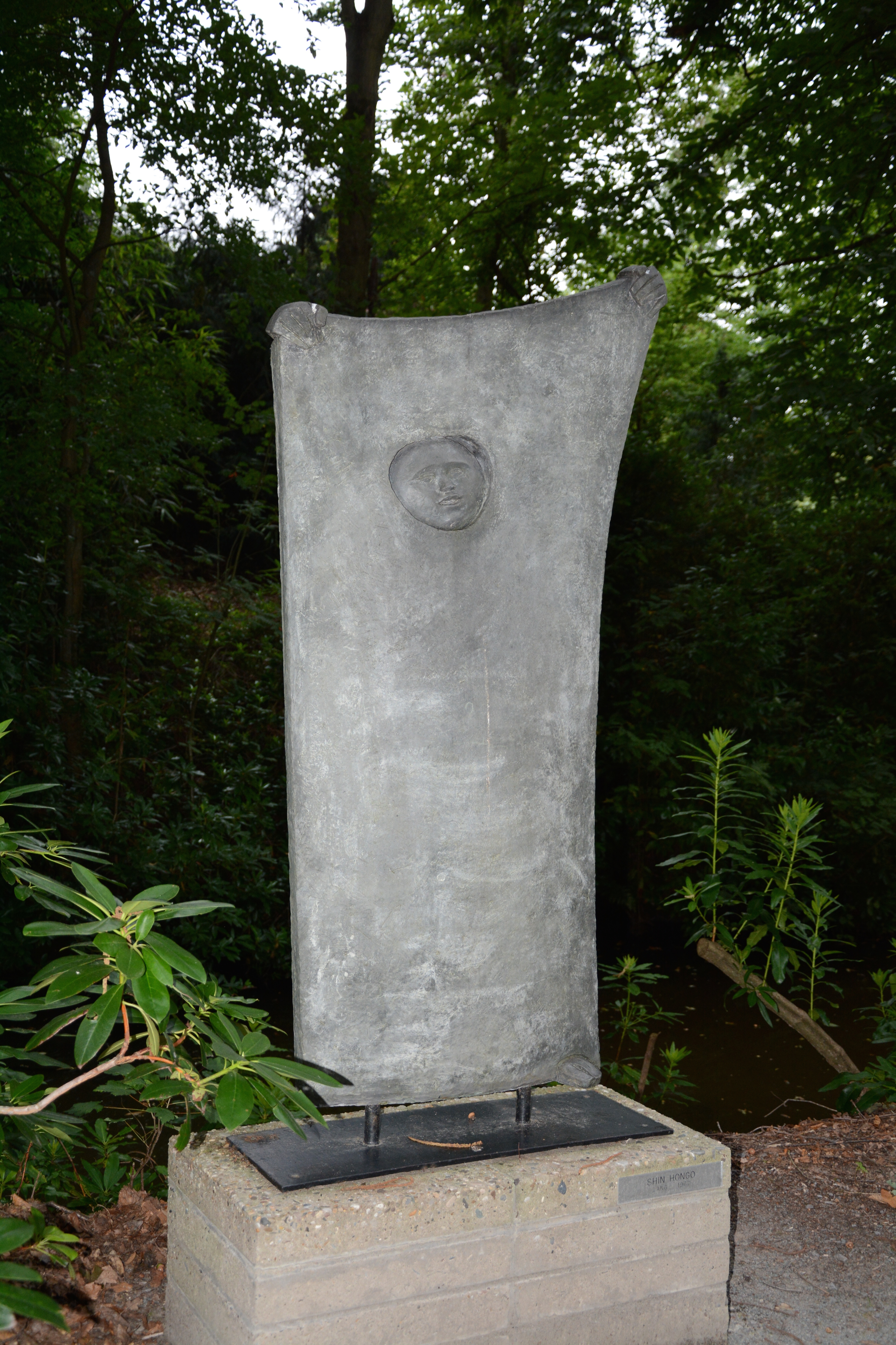 Shin Hongo, Zang, 1967